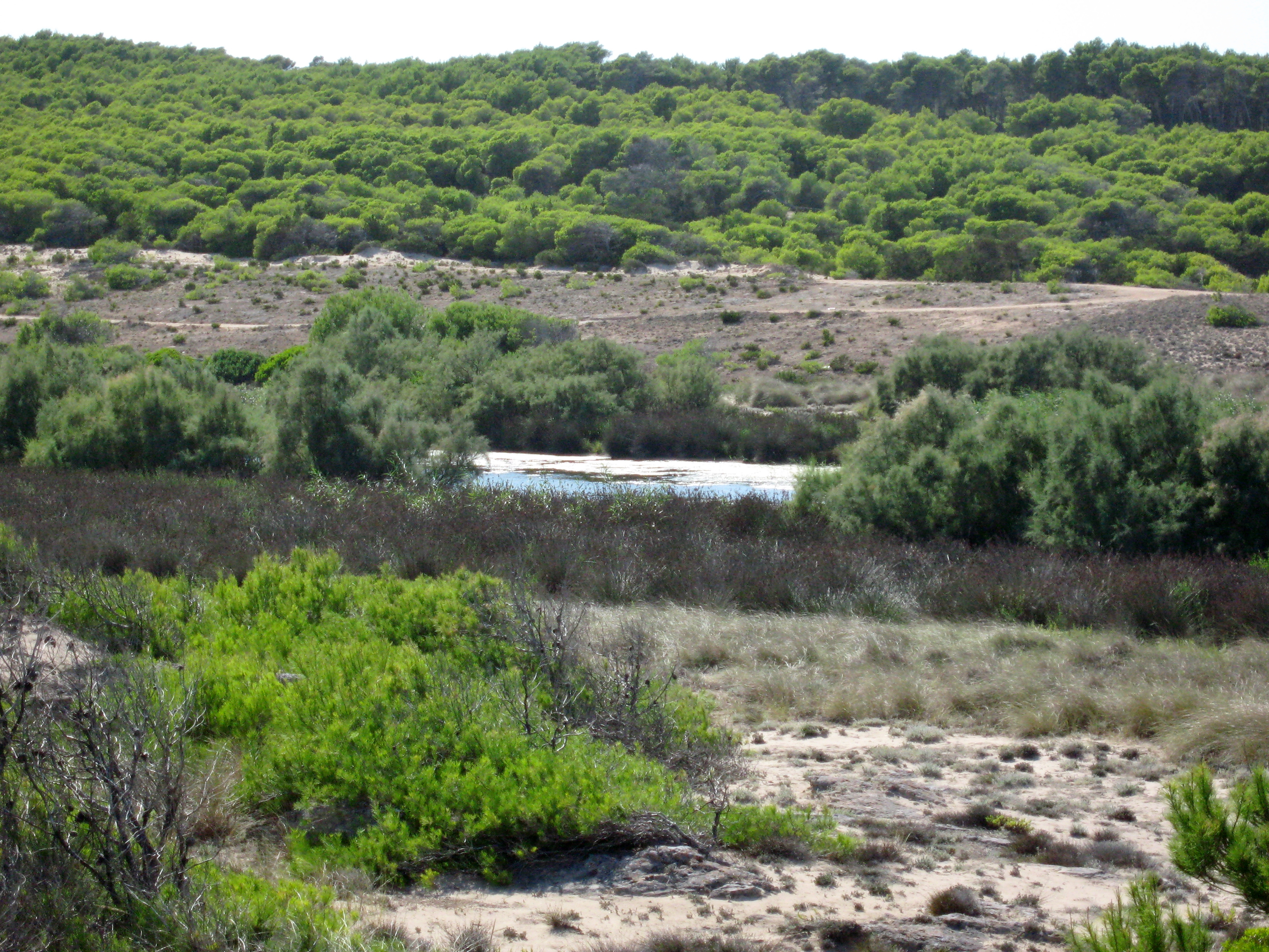 Teich s’Estany des Bisbe am Torrent de na Borges, Gemeindegrenze Artà – Santa Margalida, Mallorca, Spanien